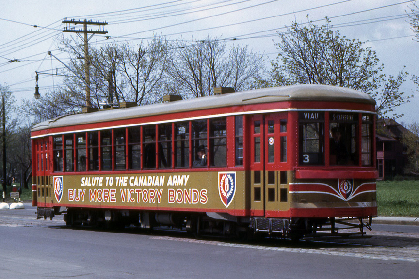 Tramway publicitaire pendant la seconde Guerre mondiale.